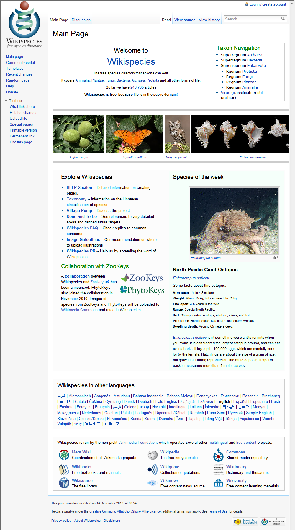 Tampilan Species